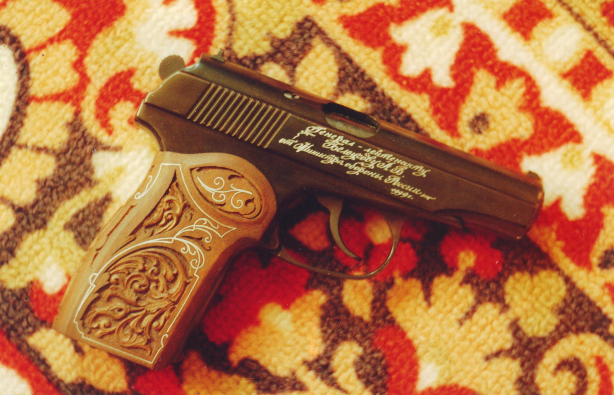 Наградной ПМ - ген.л-ту Белоусову А.В. от Министра Обороны России 1999г. (изг. г.Тула)